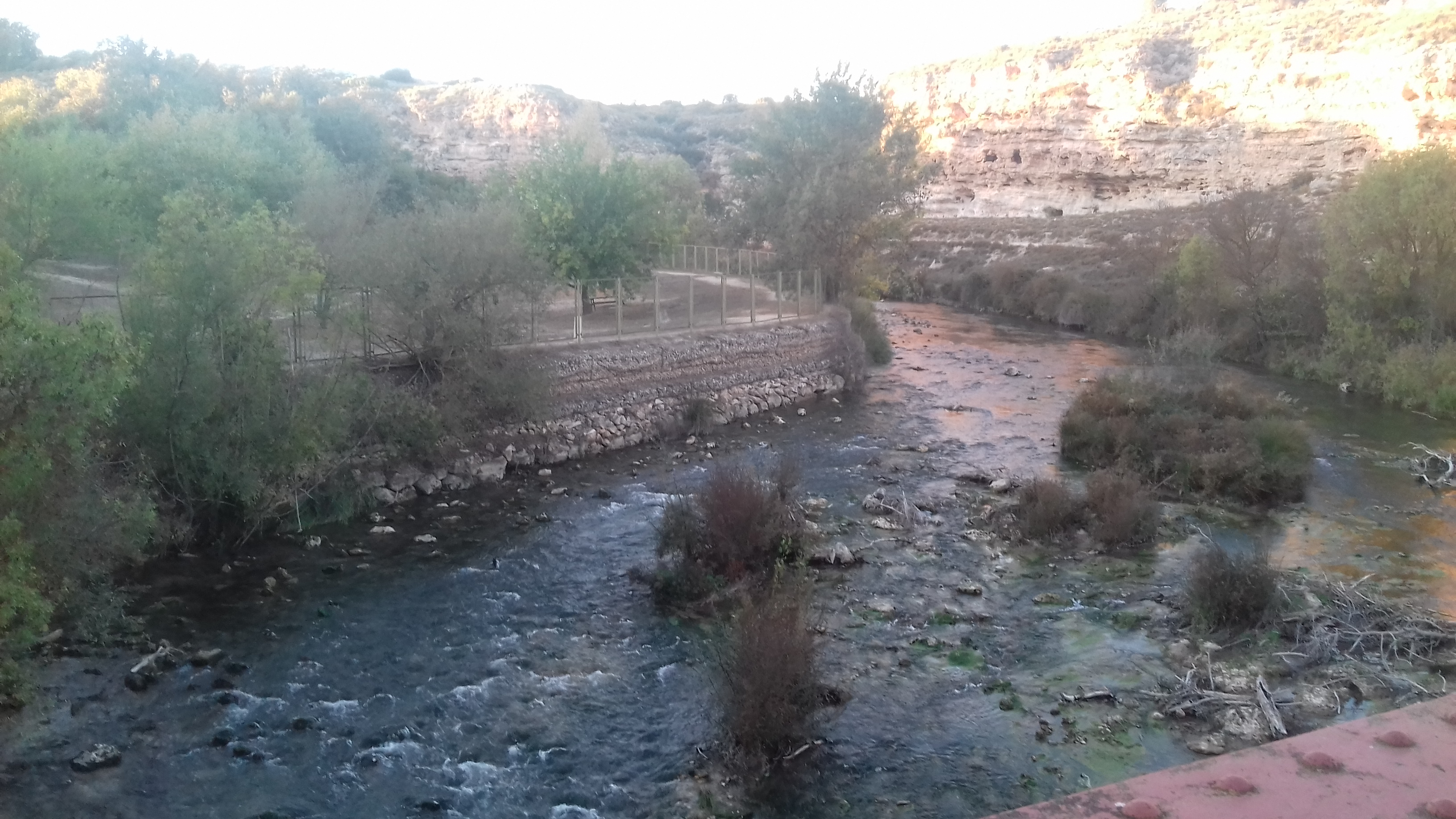 Paraje de Cuasiermas. Albacete